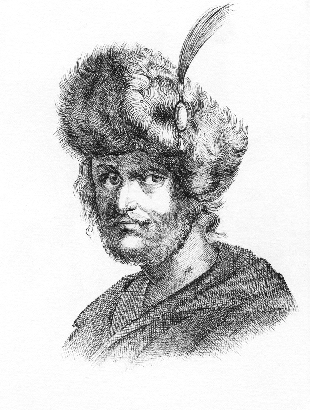 Dymitr Samozwaniec II